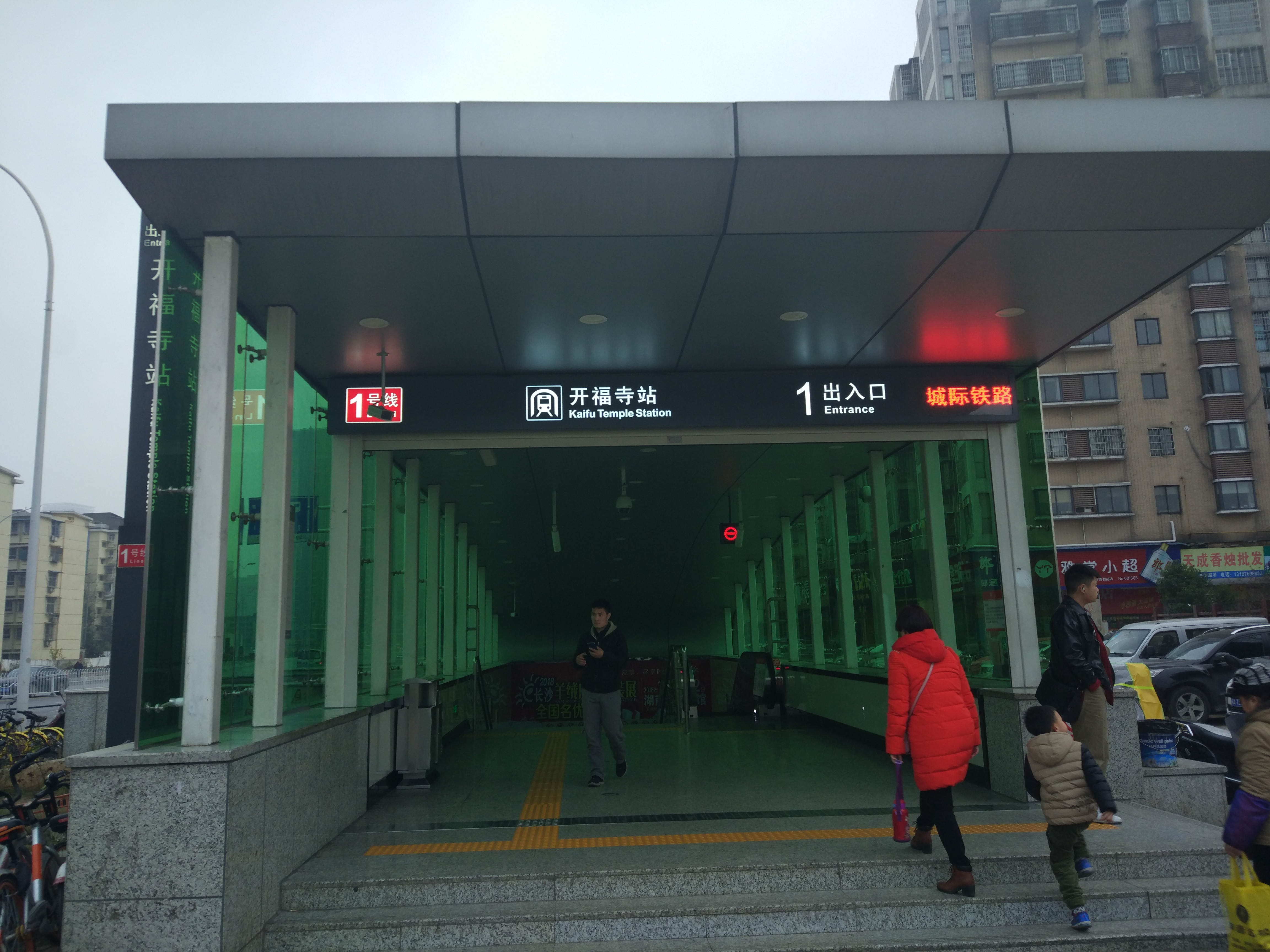 长沙地铁1号线开福寺站1号出入口